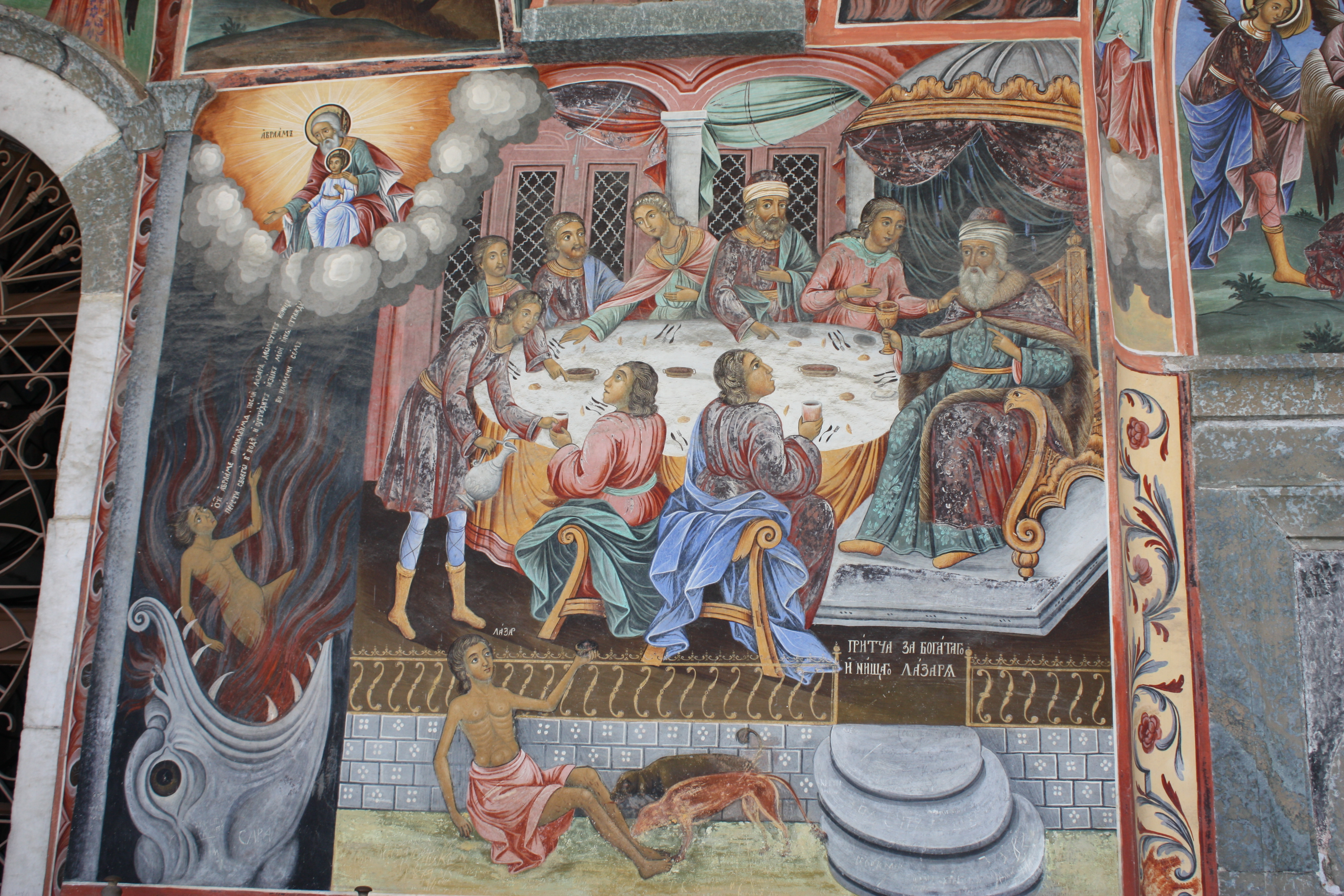 Rila Monastery, Rilakloster, Kloster Rila, Рилски манастир, Bulgaria